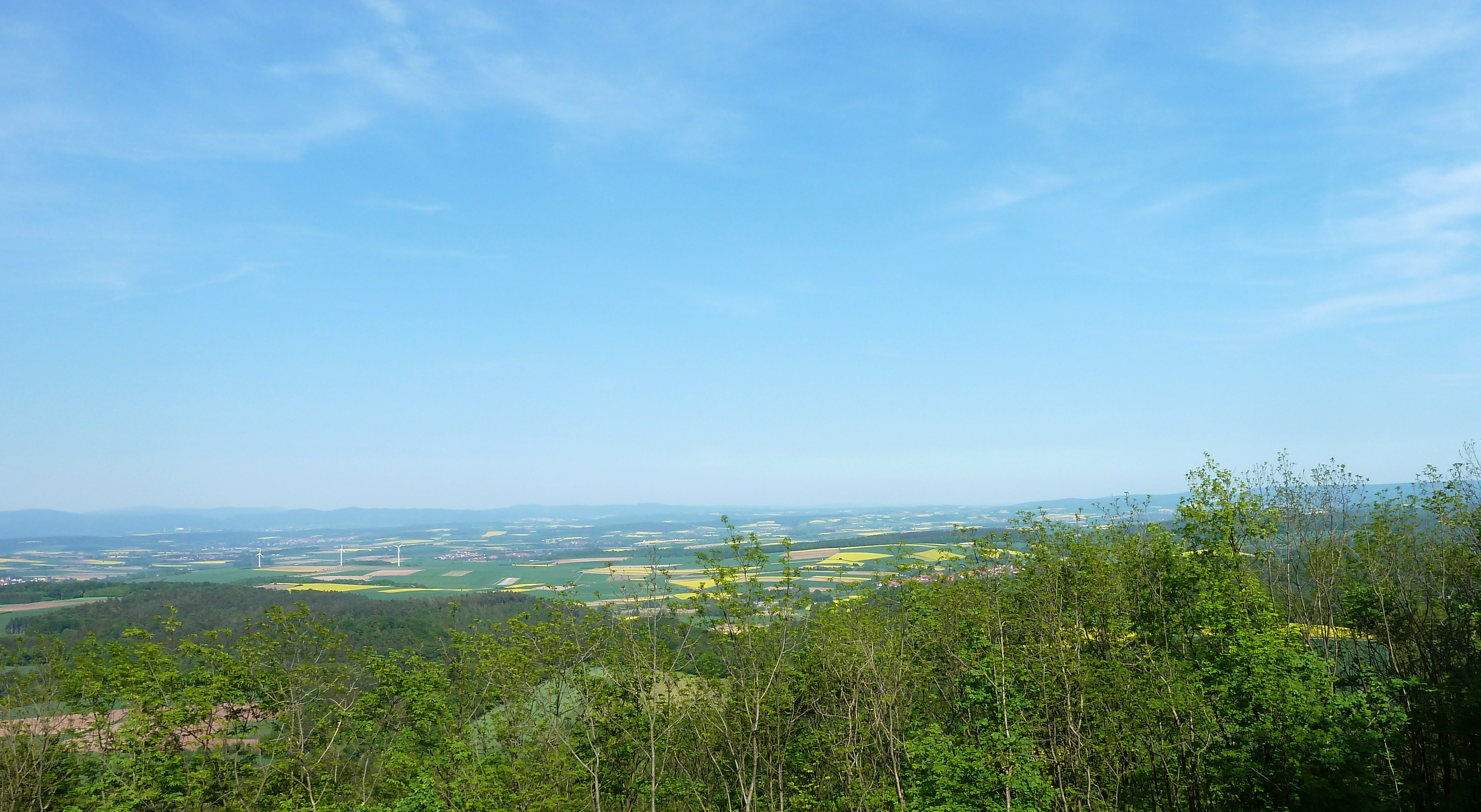 Blick vom Aussichtsturm Harzblick nahe der Mackenröder Spitze nach Osten. Ganz links Ebergötzen, links der Mitte der Seeburger See. Ganz im Hintergrund links der Harz, rechts das Ohmgebirge.